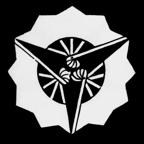 三つ雁木扇